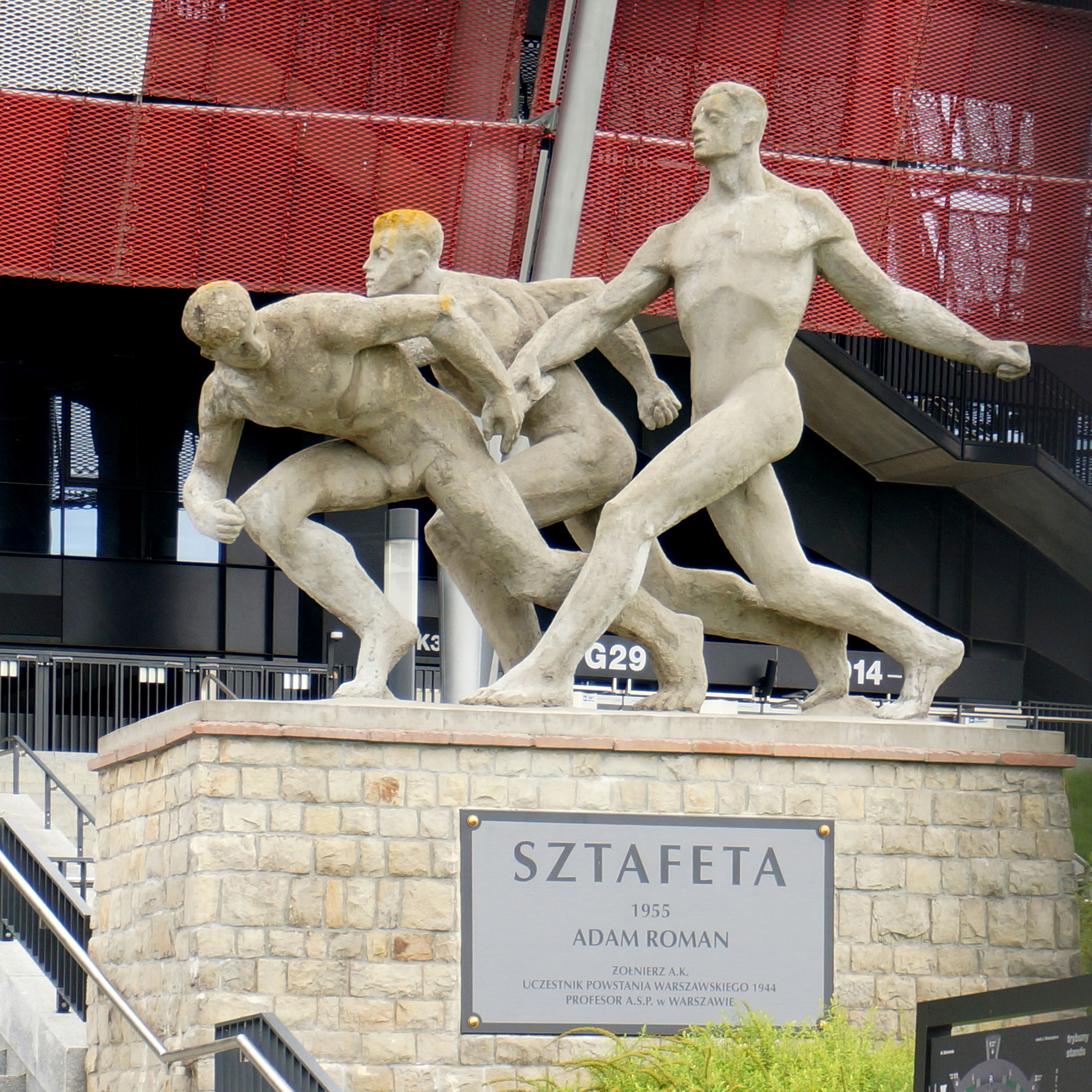 Rzeźba Adama Romana, "Sztafeta".